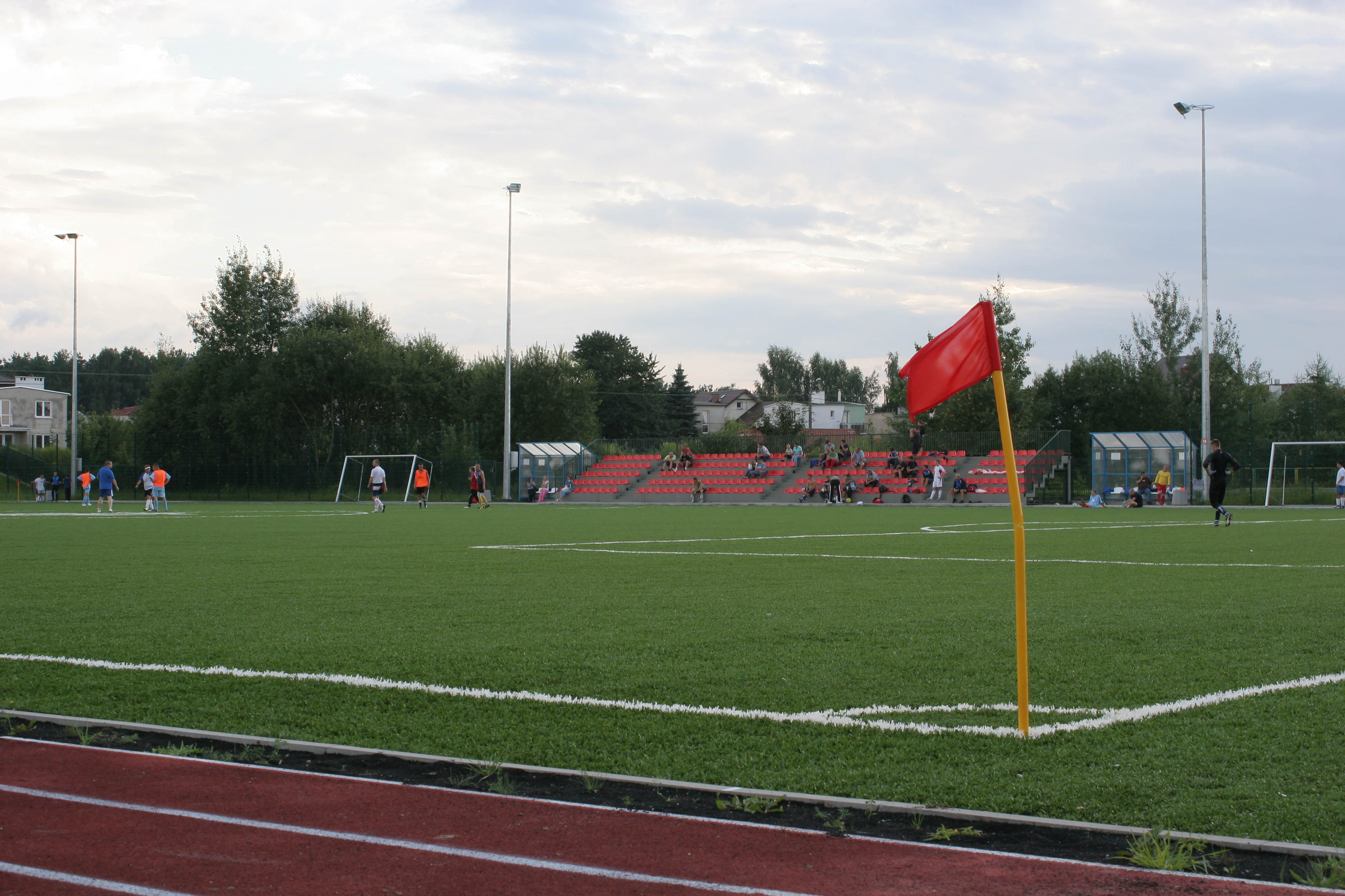 Boisko Orlik na olsztyńskich Dajtkach